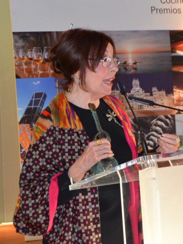 No han nacido en Madrid pero ha sido en esta ciudad donde han desarrollado gran parte de su vida personal y profesional. A ellos, a esos andaluces madrileños o madrileños de Andalucía, ha querido reconocerlos la Semana de Andalucía en Madrid, una cita que nace este este año de la mano de la Federación de Casas Andaluzas del Centro de España (FECACE), y en la que ha colaborado activamente el Ayuntamiento de Madrid. Luis Cueto, coordinador general de Alcaldía, ha entregado estos primeros reconocimientos de una ciudad que se siente, en sus palabras, “andaluza por los poros”. Cueto agradeció a FECACE la organización de una cita, que ya existe en otras ciudades del país. “Lo andaluz se desborda por Madrid, que es una ciudad en la que nadie es extranjero y que atrajo, sobre todo a la generación anterior a la mía, a tantos y tantos andaluces a trabajar aquí”, subrayó.